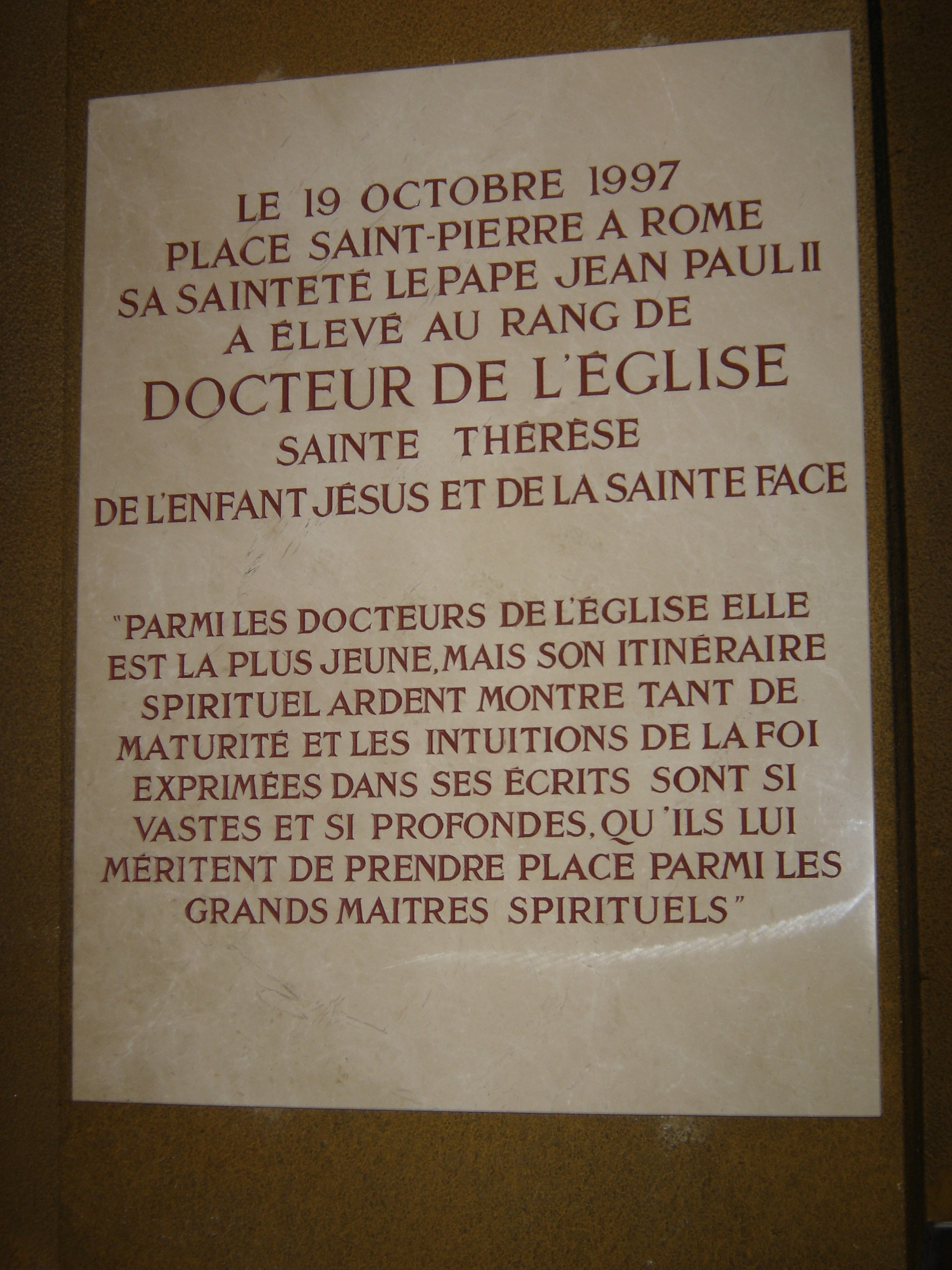 Plaque commémorative dans la Basilique de Lisieux